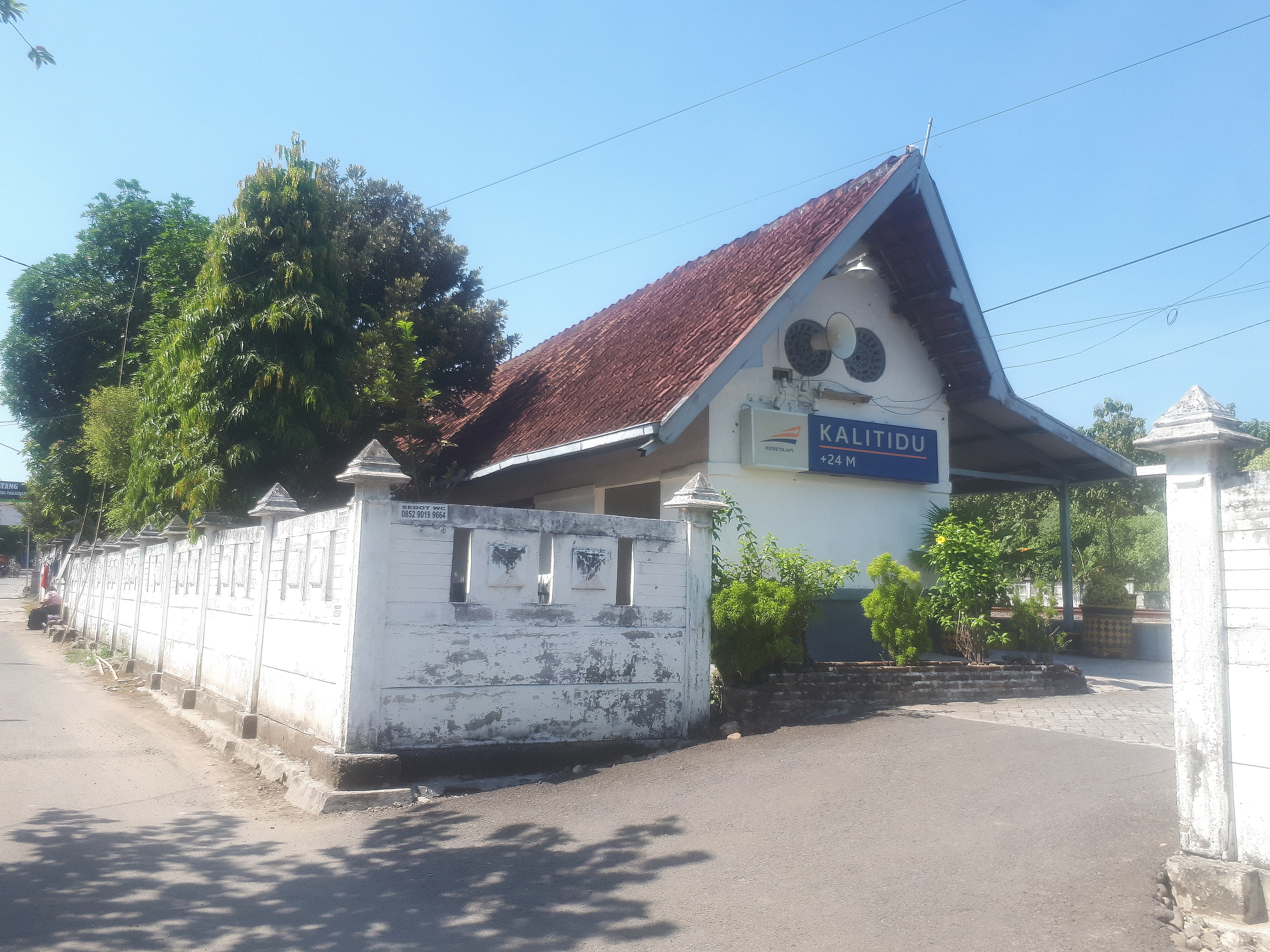 Tampak luar Stasiun Kalitidu, 2020